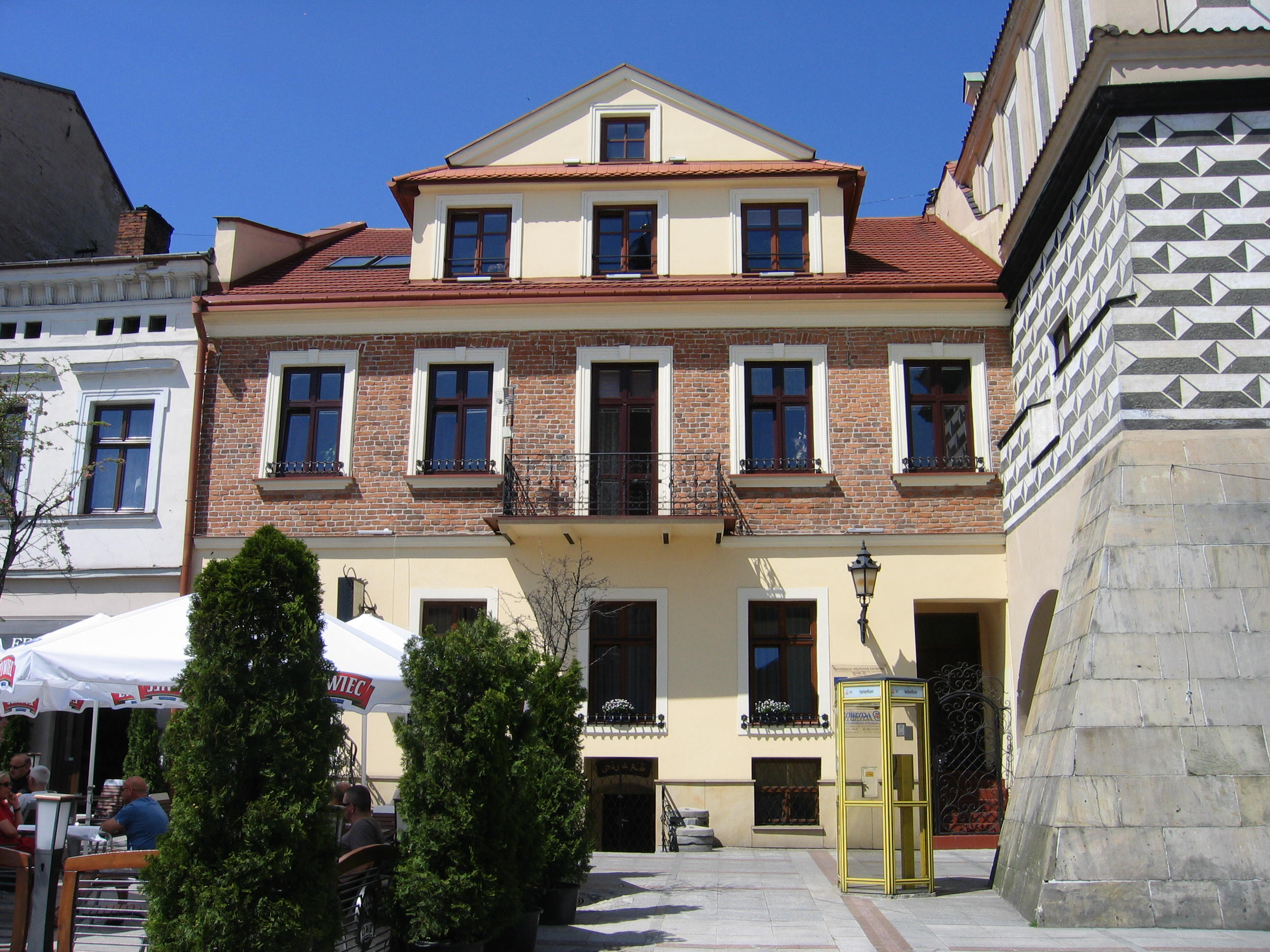 Tarnów, Rynek 22 - kamienica z oficyną (zabytek nr A-30/M z 29.09.2005)